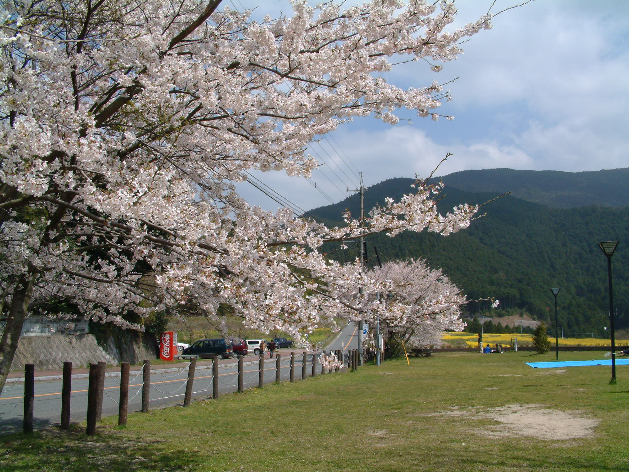 福岡県道92号宗像篠栗線にある公園